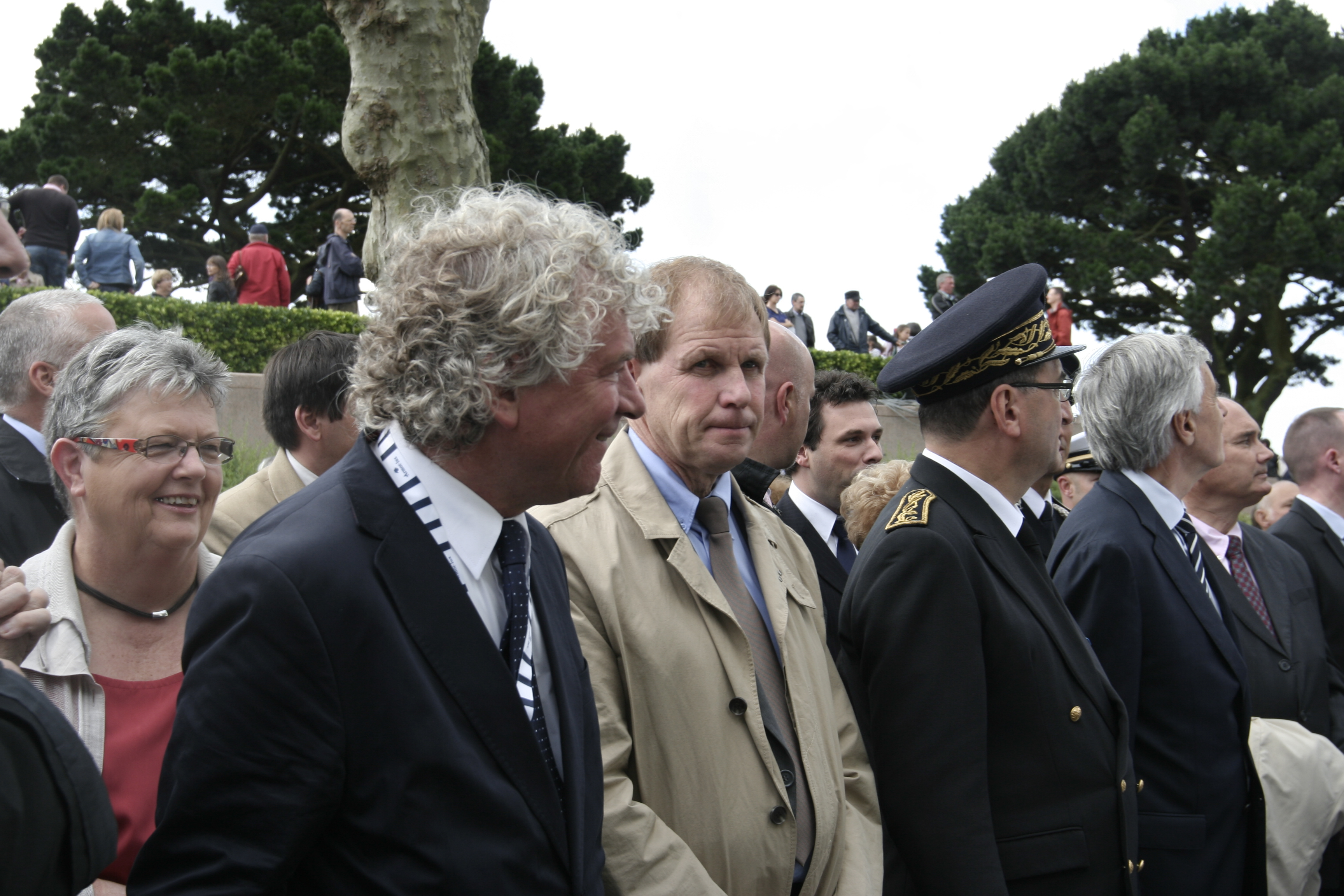 Défilé du 14-juillet à Brest, en marge des Tonnerres de Brest 2012.